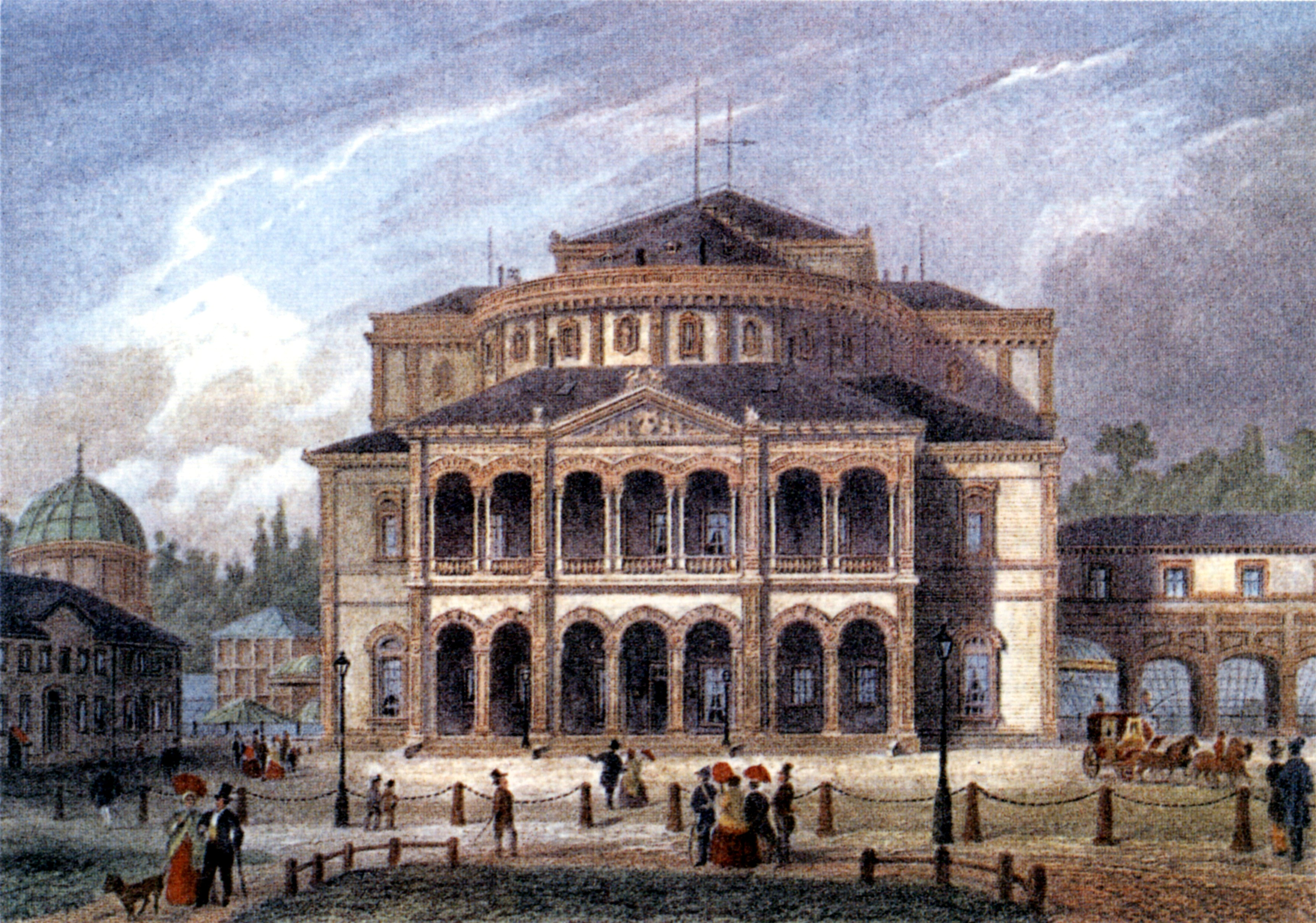 Karlsruhe, Hoftheater (Neubau von Heinrich Hübsch, eröffnet 1853), kolorierte Lithographie von Joh. Poppel nach einem Entwurf von L. W. Beyrer, o. J. Theaterwissenschaftliche Sammlung der Universität zu Köln (Schloss Wahn)